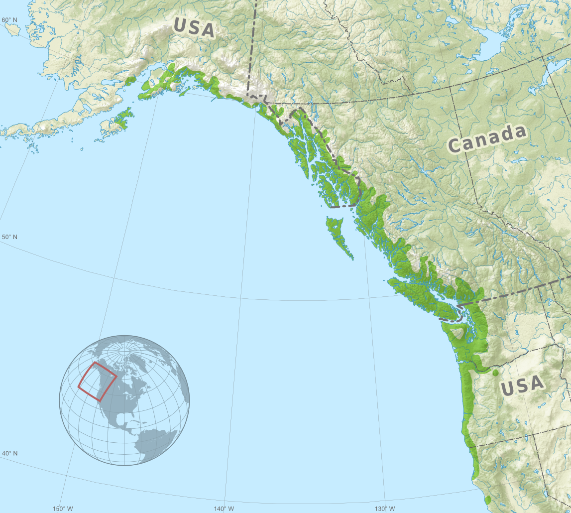 Verbreitung der Sitka-Fichte (Picea sitchensis) in Nordamerika